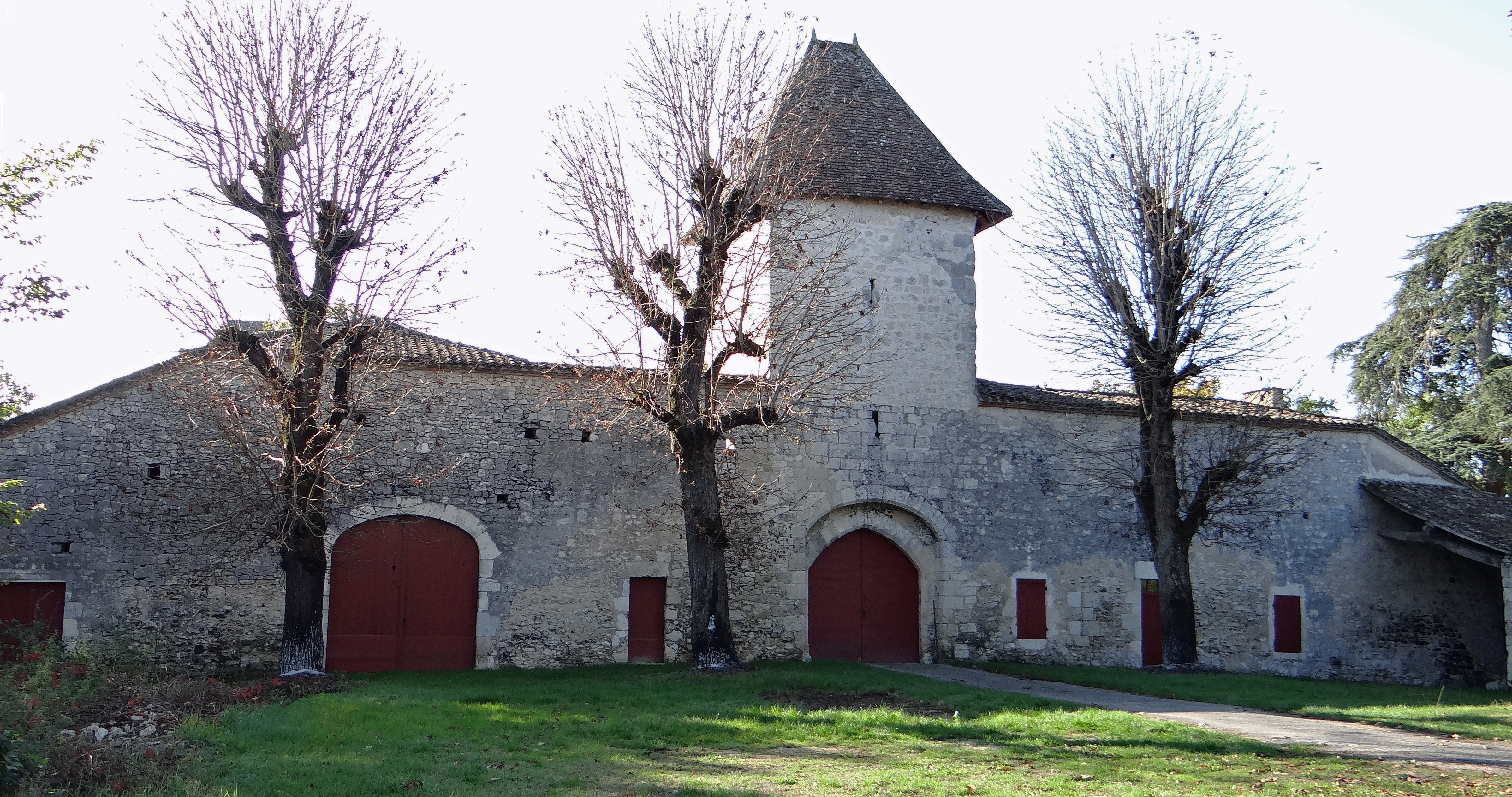 Monflanquin - Château de Roquefère - Entrée